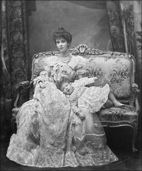 Consuelo Vanderbilt (1877-1964)